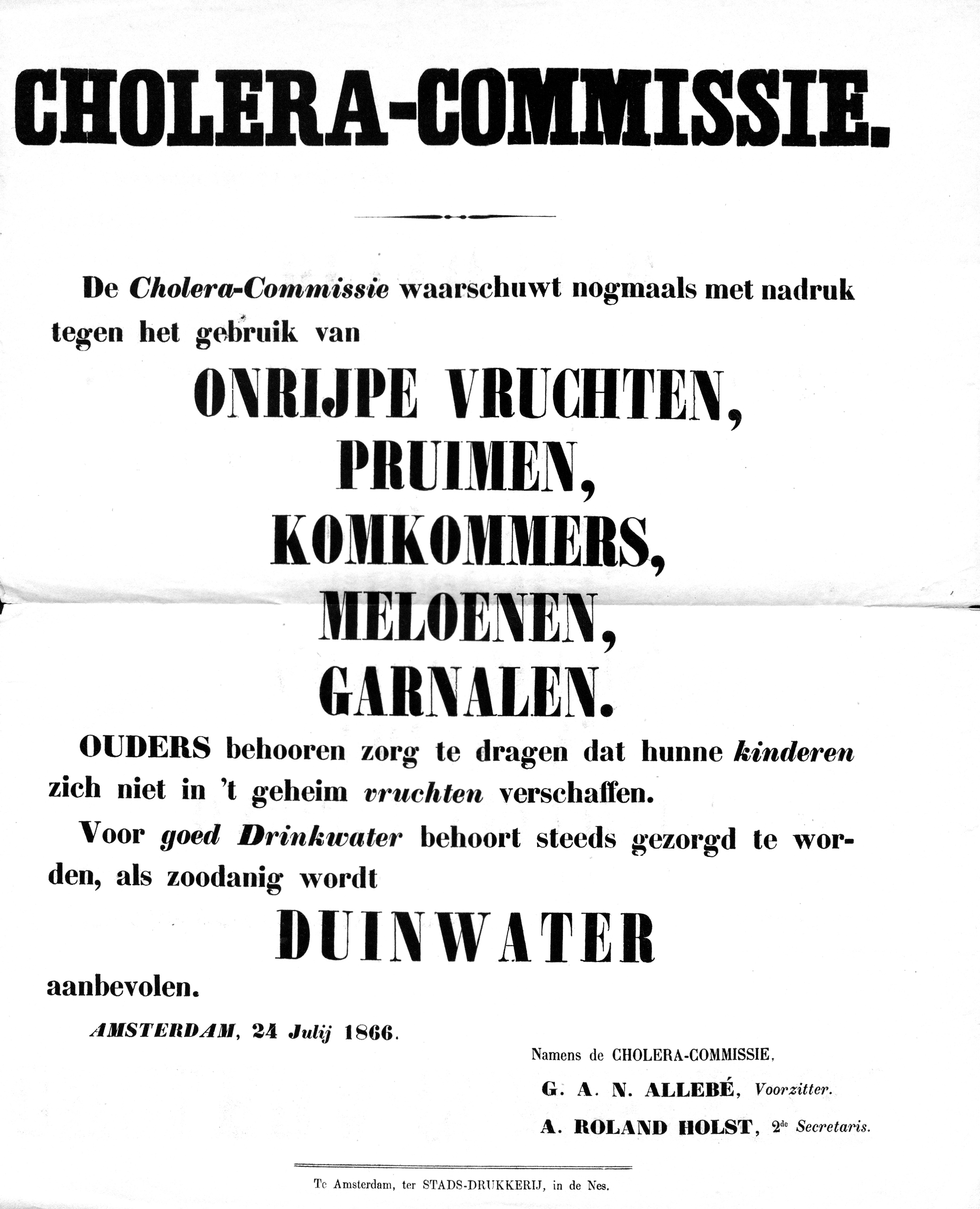 Pamflet uit 1866 waarmee de Choleracommissie waarschuwde dat mensen op voedsel en drinkwater moesten letten.